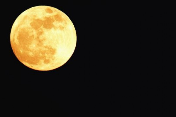 Fenómeno Lunar de La Luna Azul Captado el Viernes 31 de Agosto de 2012 En La Ciudad de Guayaquil, Ecuador.